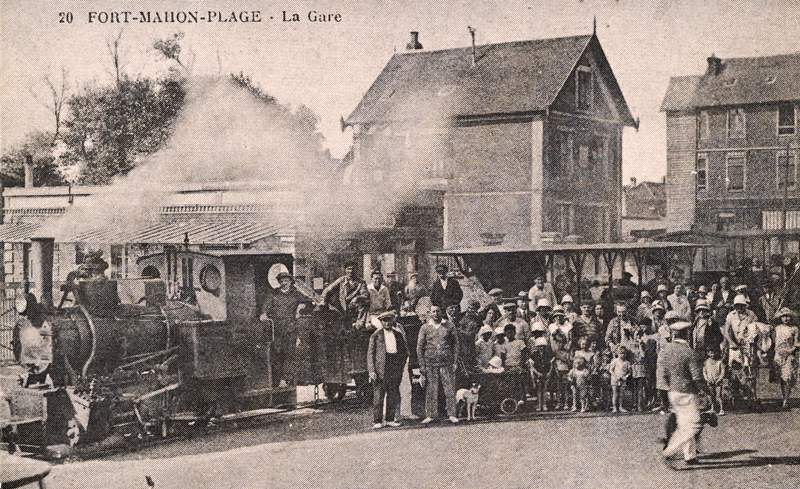 Le tramway de Quend - Fort-Mahon, la gare de Fort-Mahon